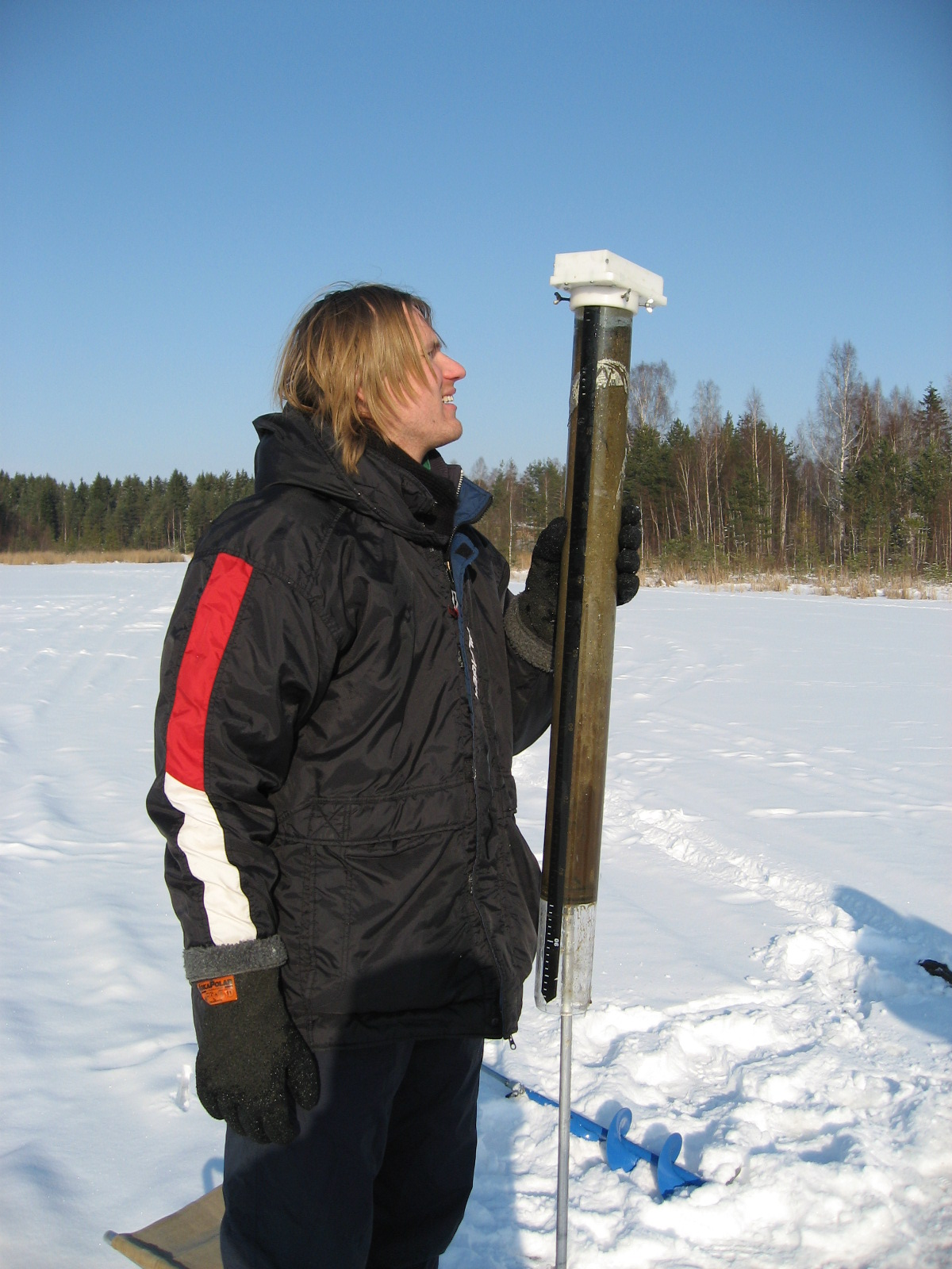 Tiit Vaasma võtab ja uurib Verevi järve setteproove